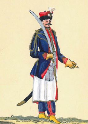 49. Dowódca husarii 1 Brygady Kawalerii Narodowej (oficer chorągwi króla 1 Brygady Kawalerii Narodowej (Husarskiej)